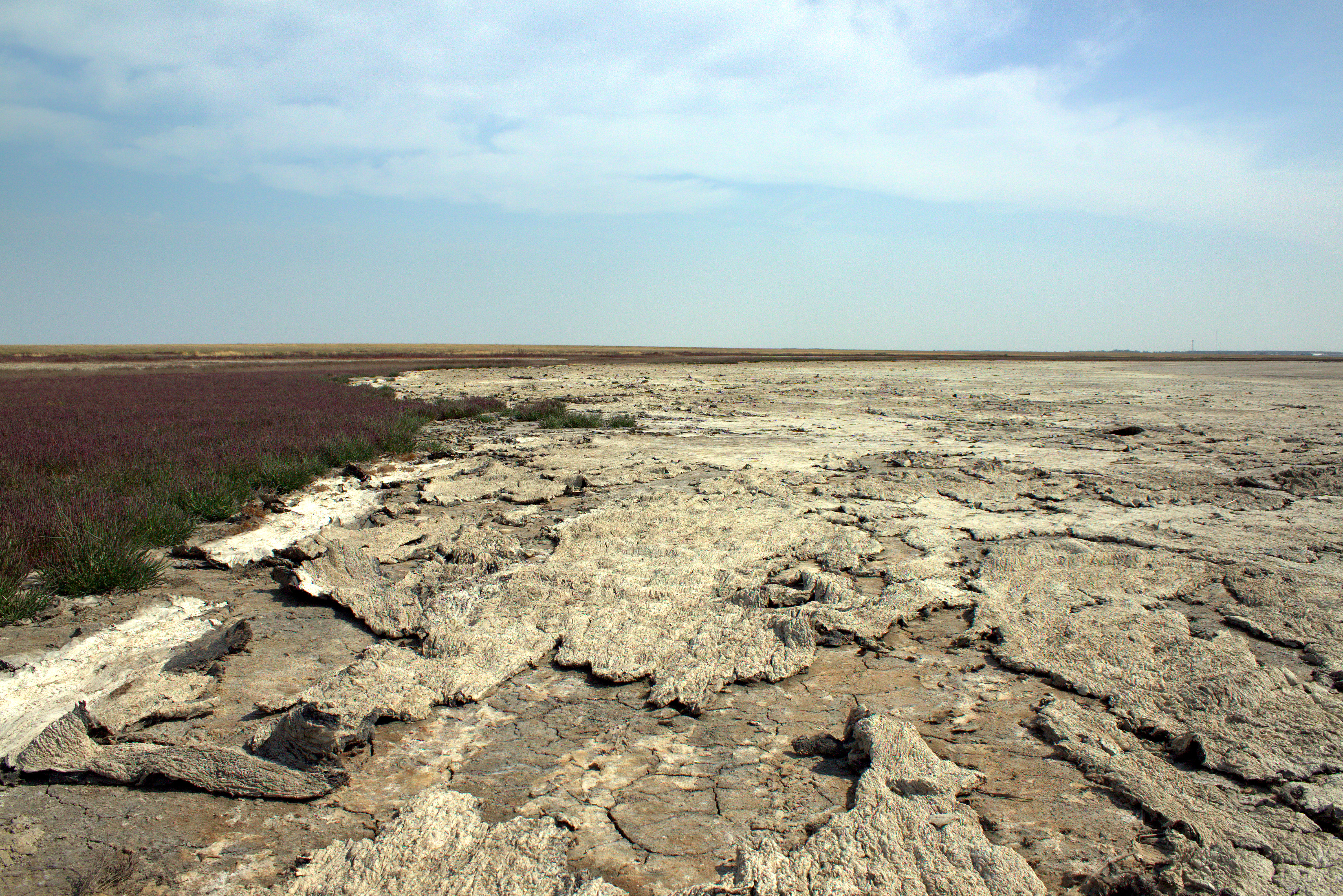 Озеро Пикетное в Марьяновском районе Омской области